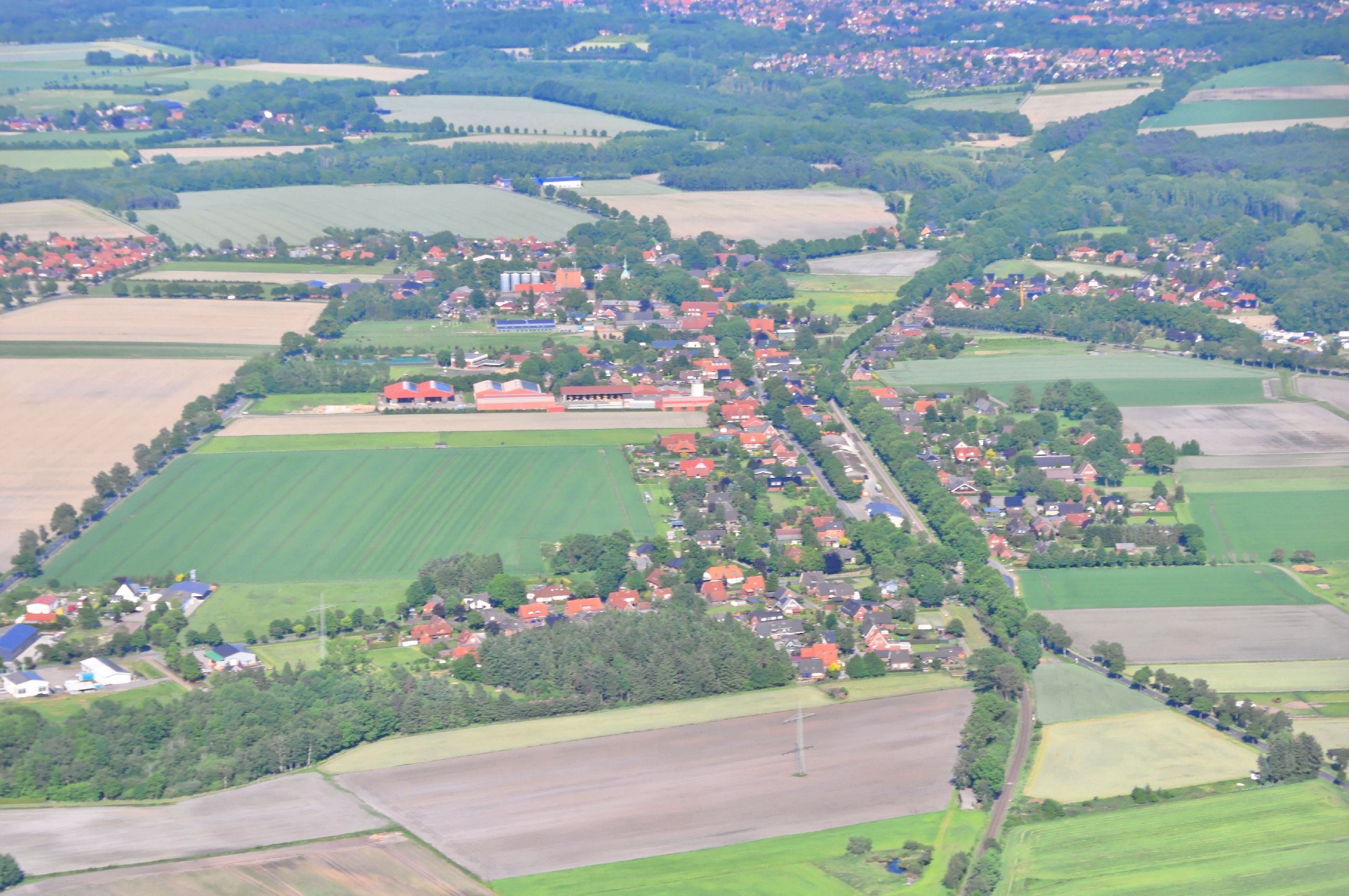 Überführungsflug vom Flugplatz Nordholz-Spieka über Lüneburg, Potsdam zum Flugplatz Schwarzheide-Schipkau